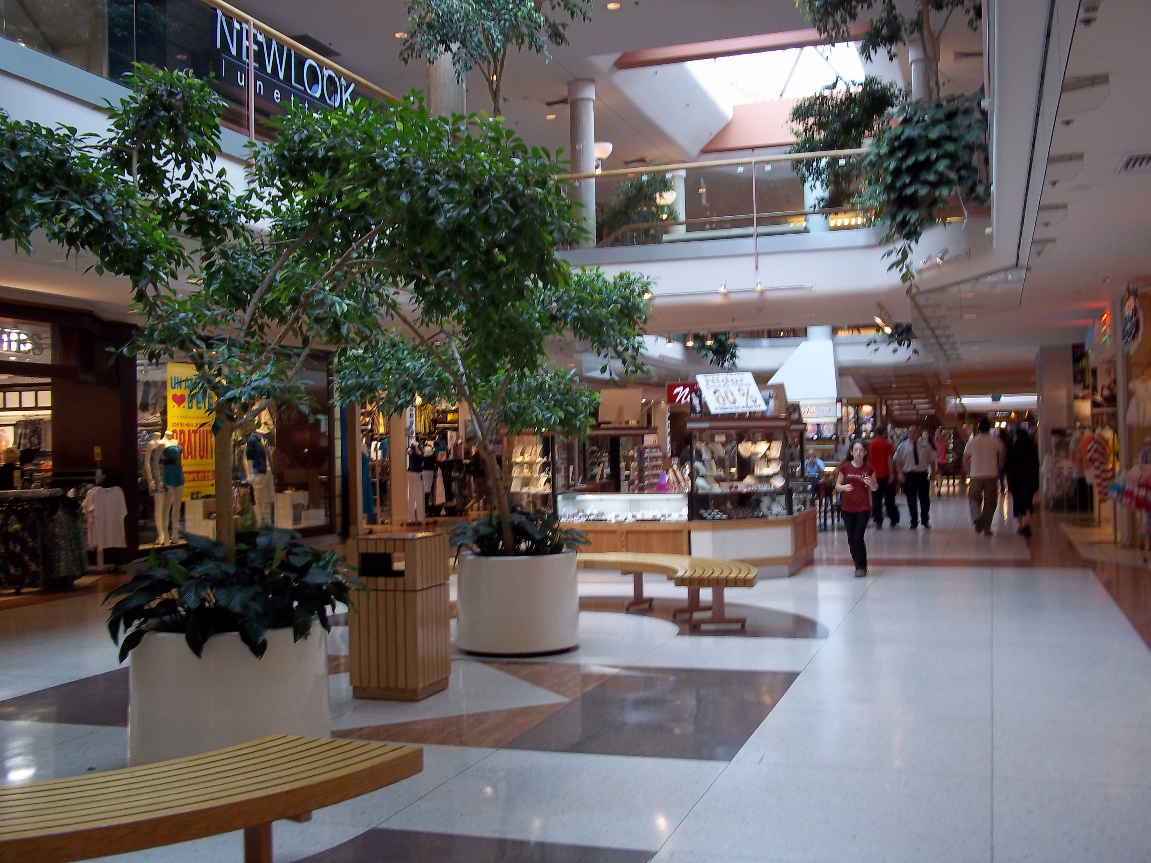 Place Versailles, Montréal